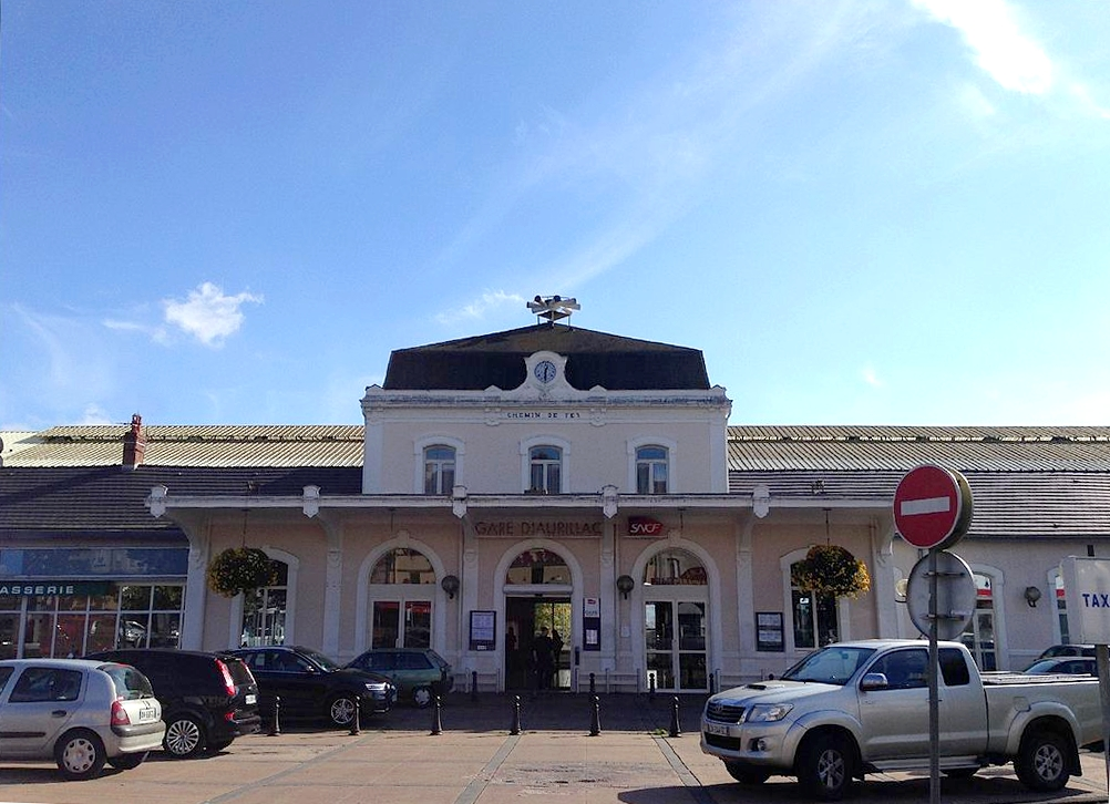 Gare d'Aurillac (Cantal, France).